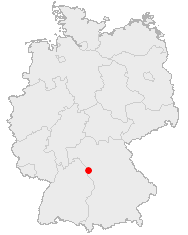 Lage von Rothenburg ob der Tauber in Deutschland